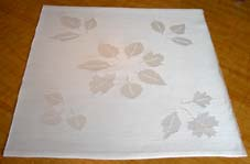 Damastduk.